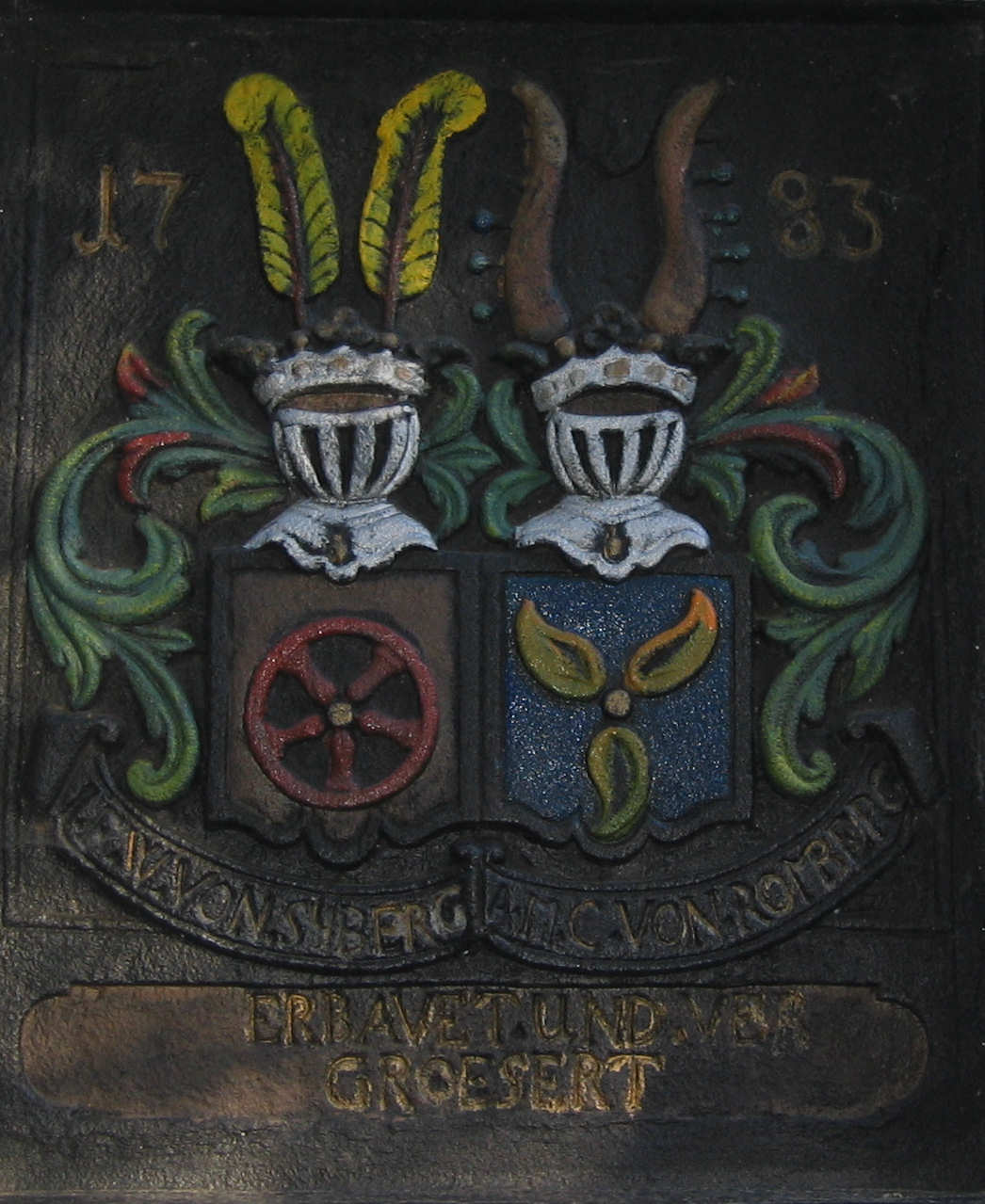 Wappen der Familien Syberg (fünfspeichiges Rad) und Romberg (rechts) an der Kapelle Wischlingen in Dortmund.